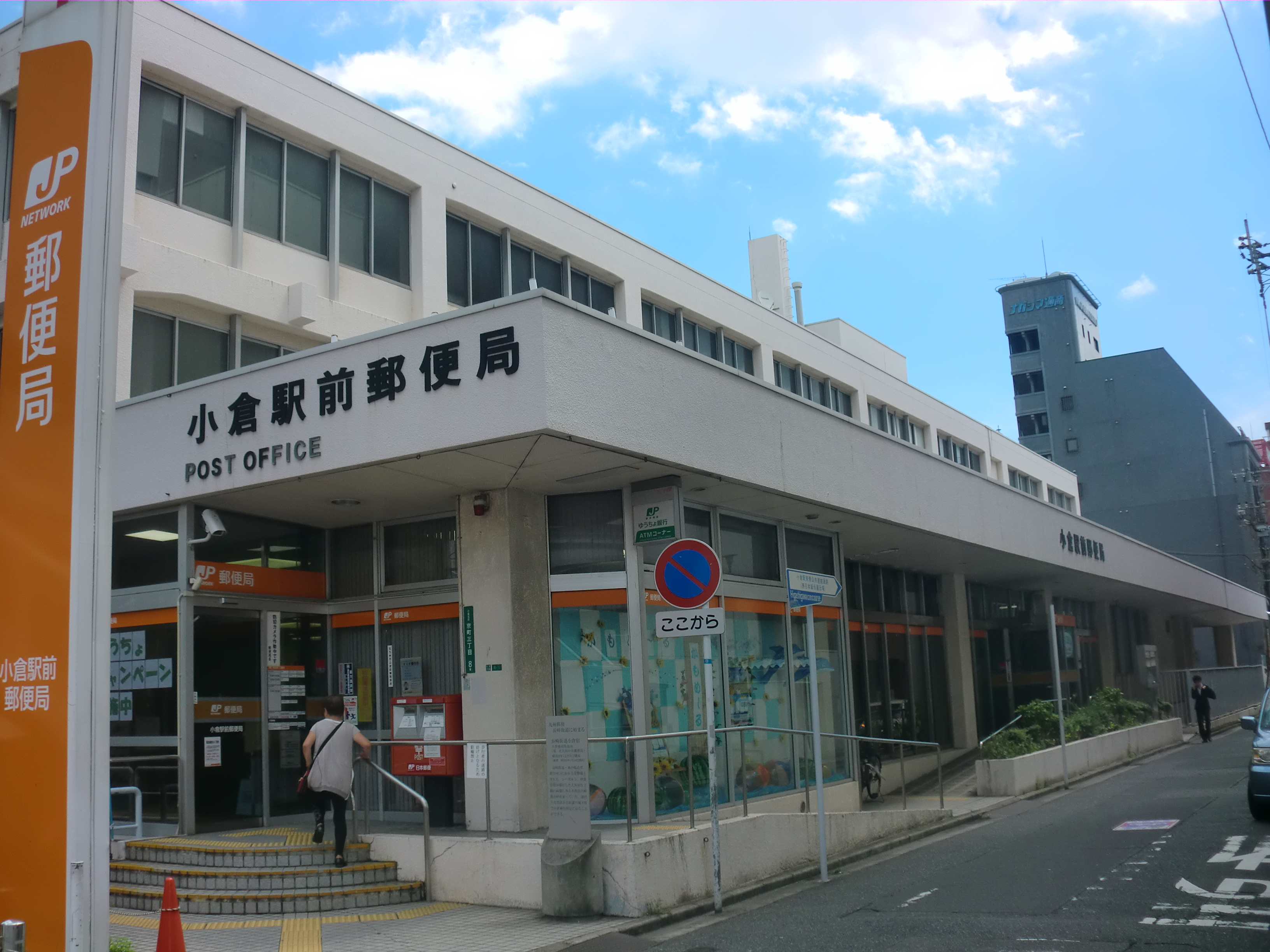 北九州市小倉北区にある小倉駅前（こくらえきまえ）郵便局（旧：北九州中央郵便局）（撤去されていますので不動産広告への利用は禁止します）